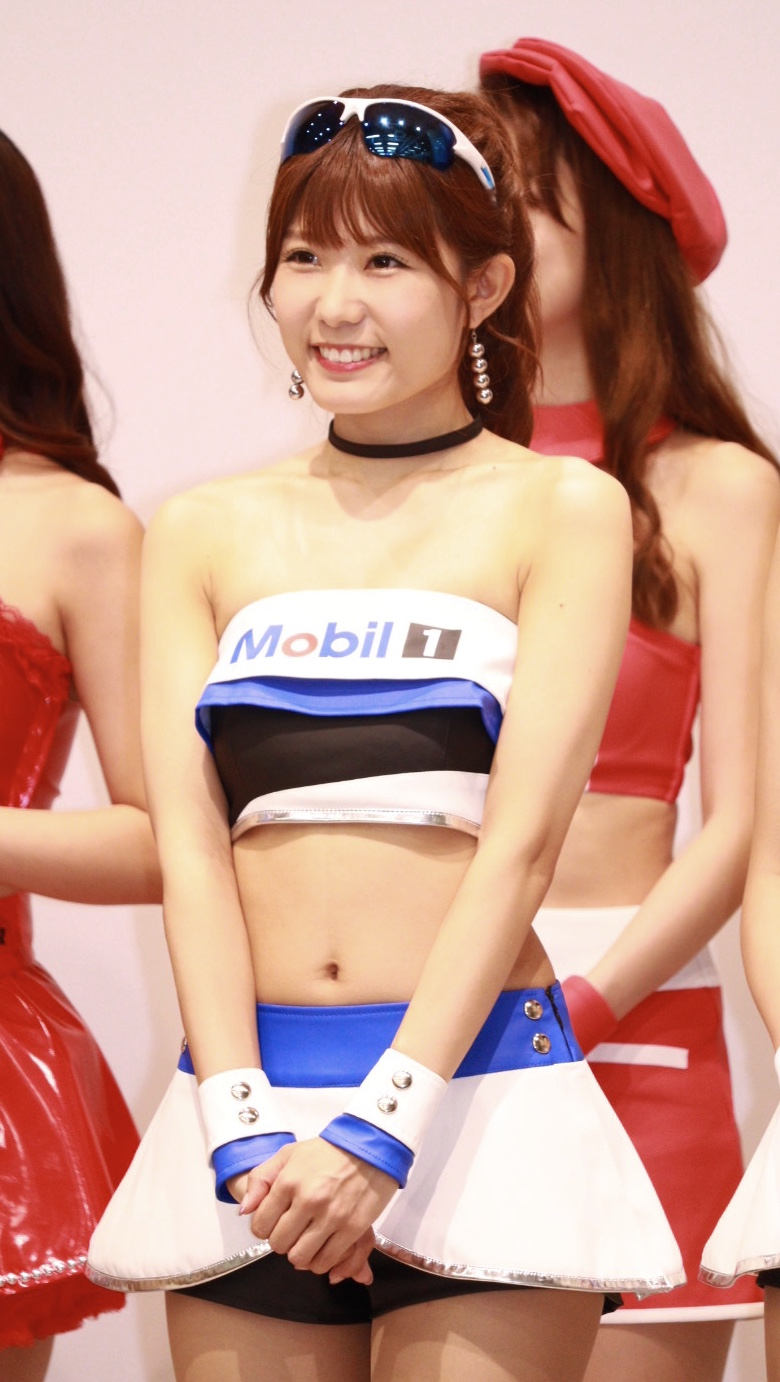 宮瀬七海 Mobil1レースクイーン2020